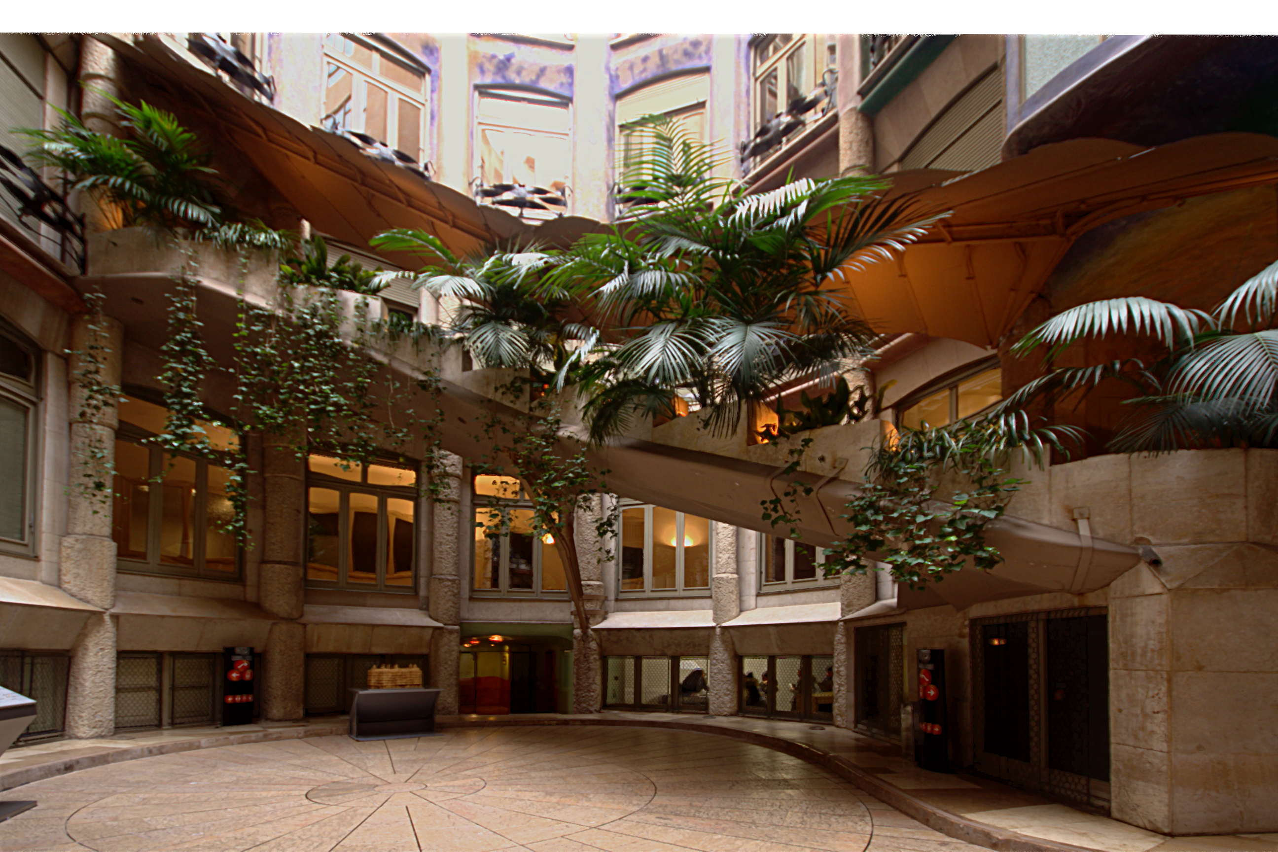 Pátio e escadaria na Casa Milà